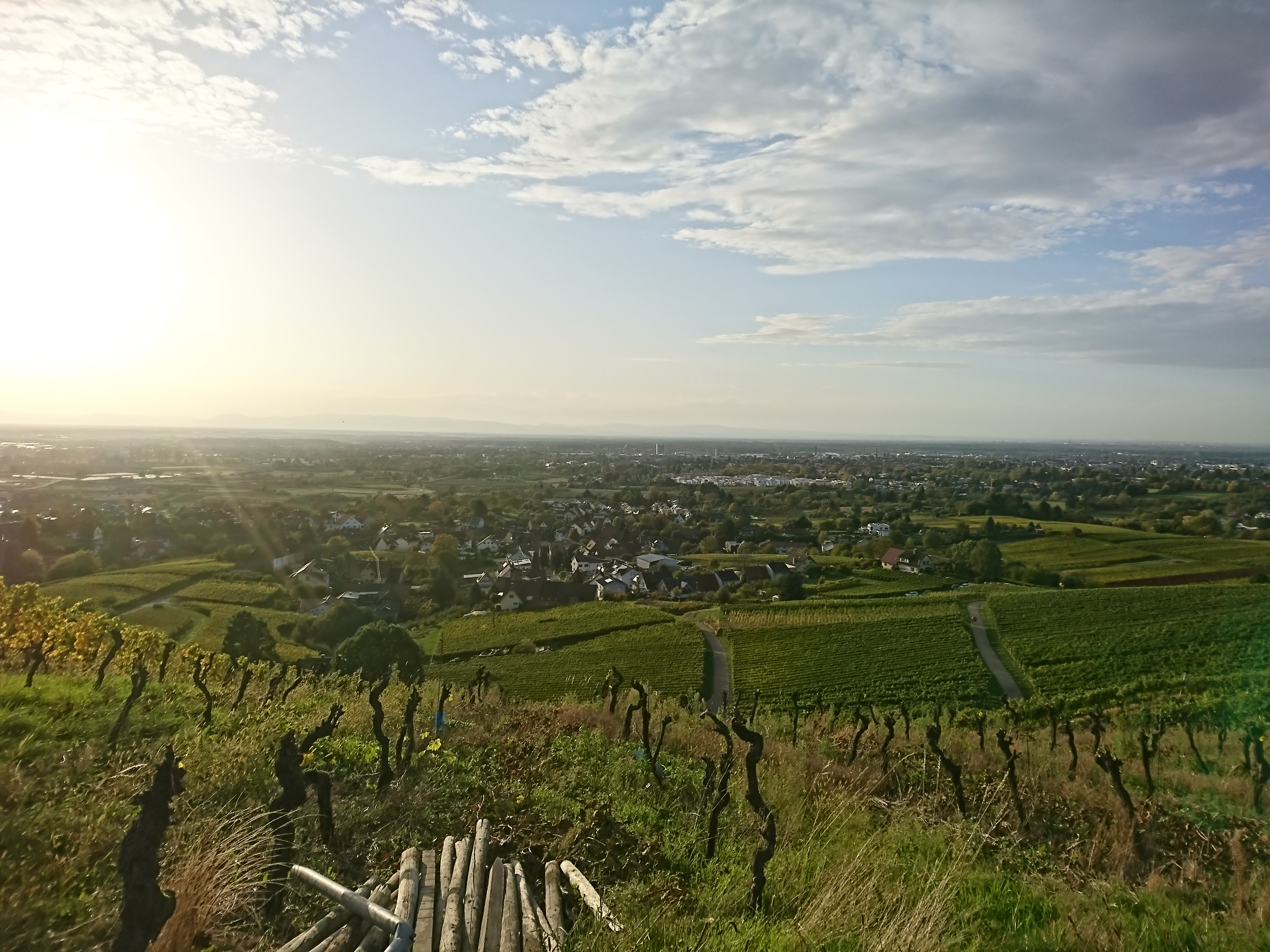 Aussicht auf die fessenbacher Reben in Richtung der Kapelle im Albersbach.